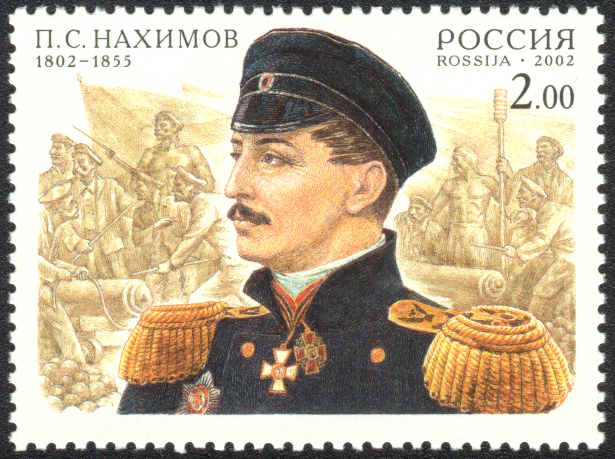 Почтовая марка России - Нахимов Павел Степанович